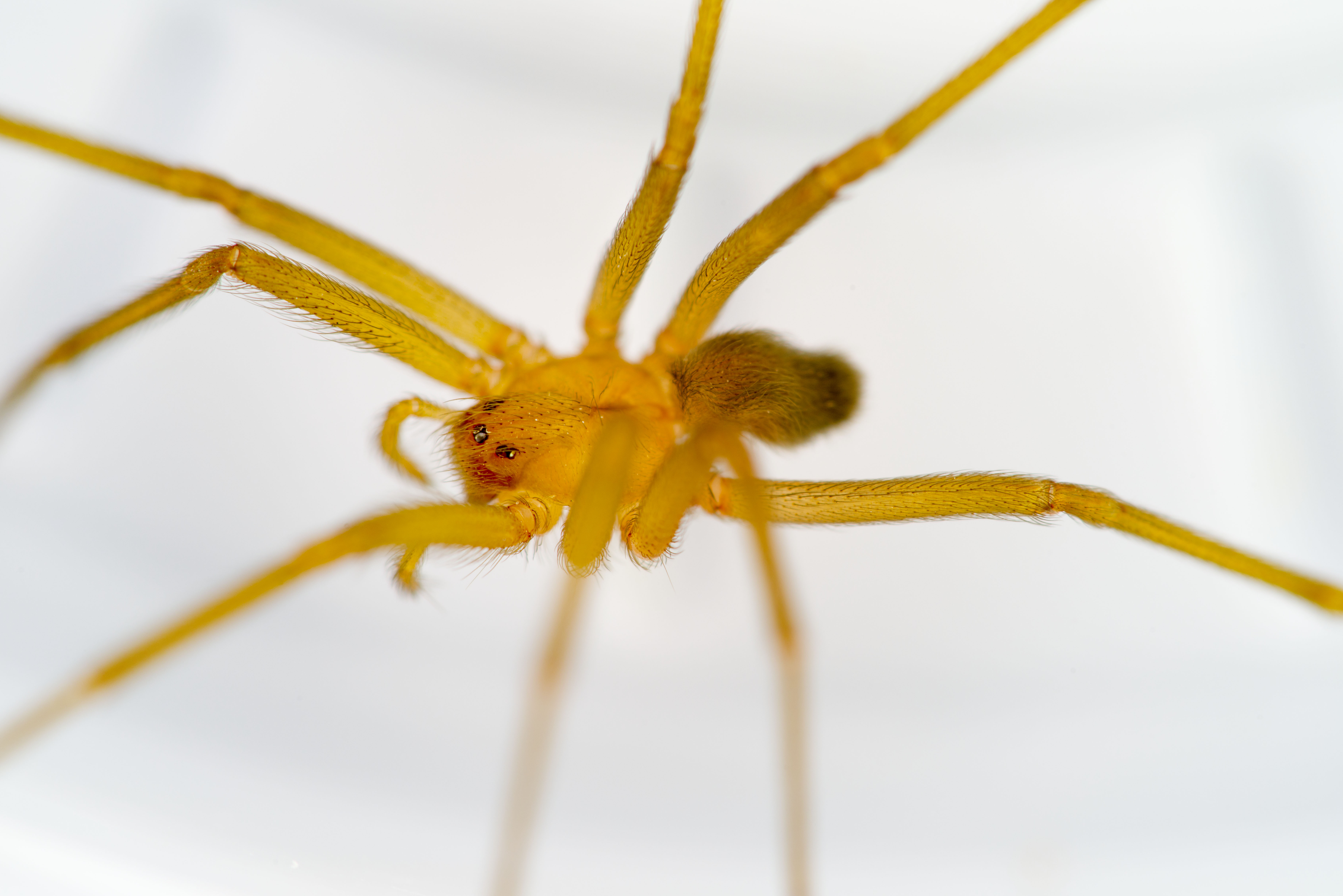 Keskenkasvuinen ruskohämähäkki (Loxosceles laeta), kuvattu 12.10.2016 Luonnontieteellisessä museossa Helsingissä.